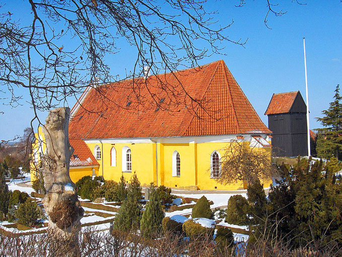 fra sydøst